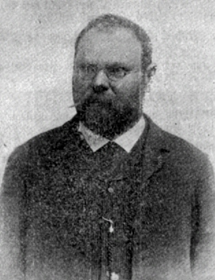 August Holder